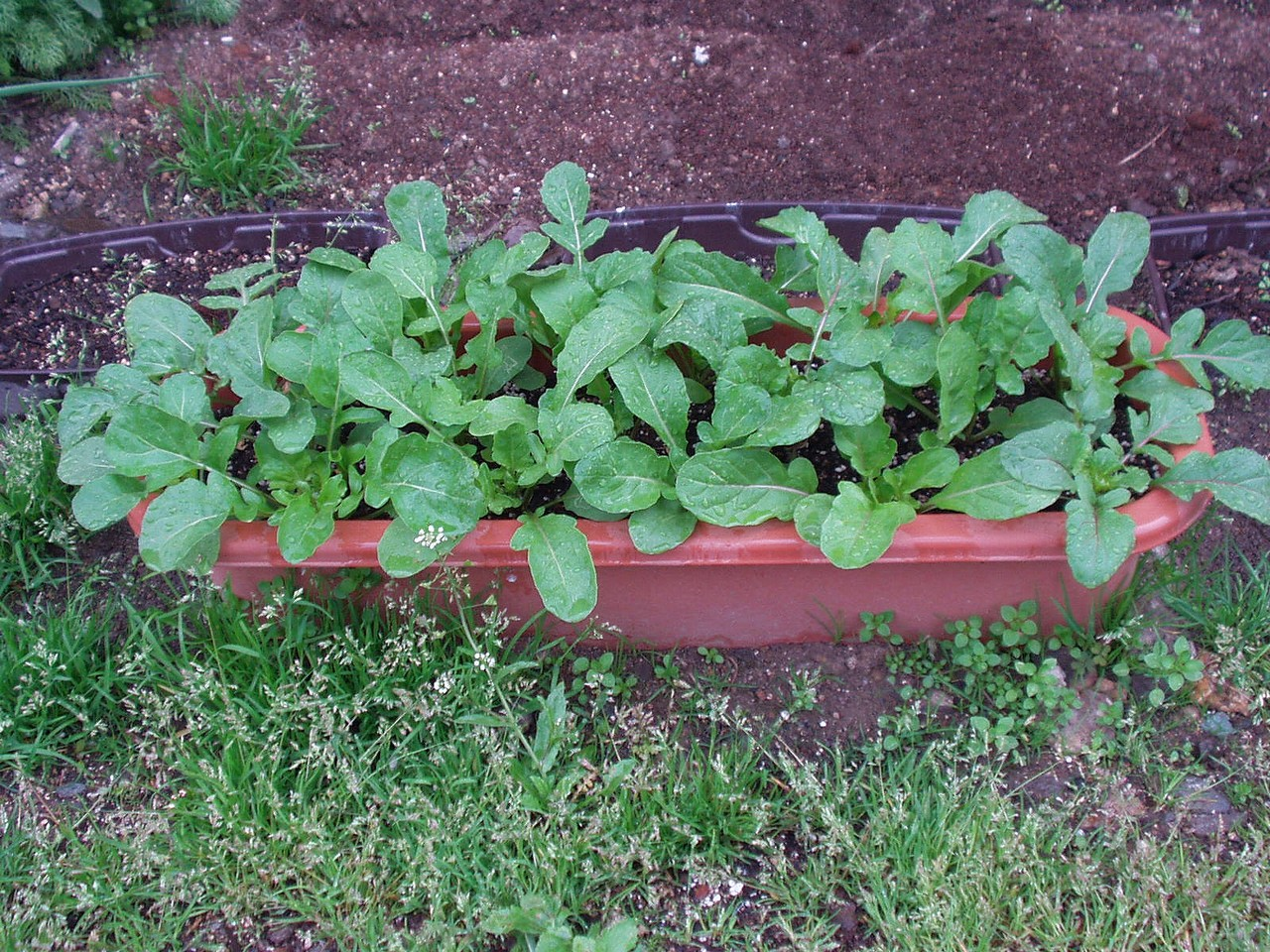 Eruca vesicaria Rocket_Herb（Aomori.Japan）